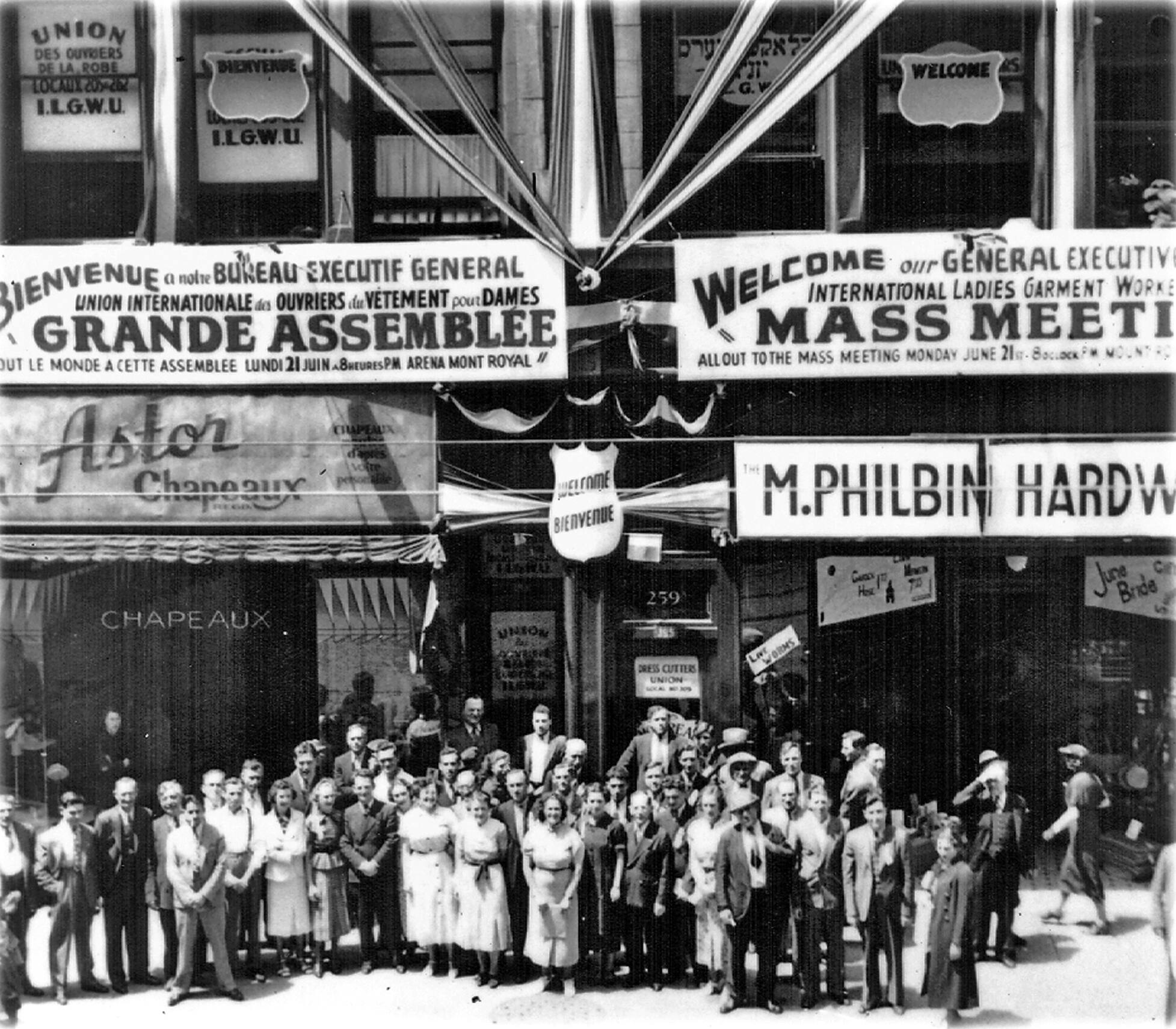 En grève avec Léa et les midinettes, rue Sainte-Catherine Ouest, Montréal, printemps 1937 Le numéro civique d'alors, 259, correspond au numéro 391 actuel.